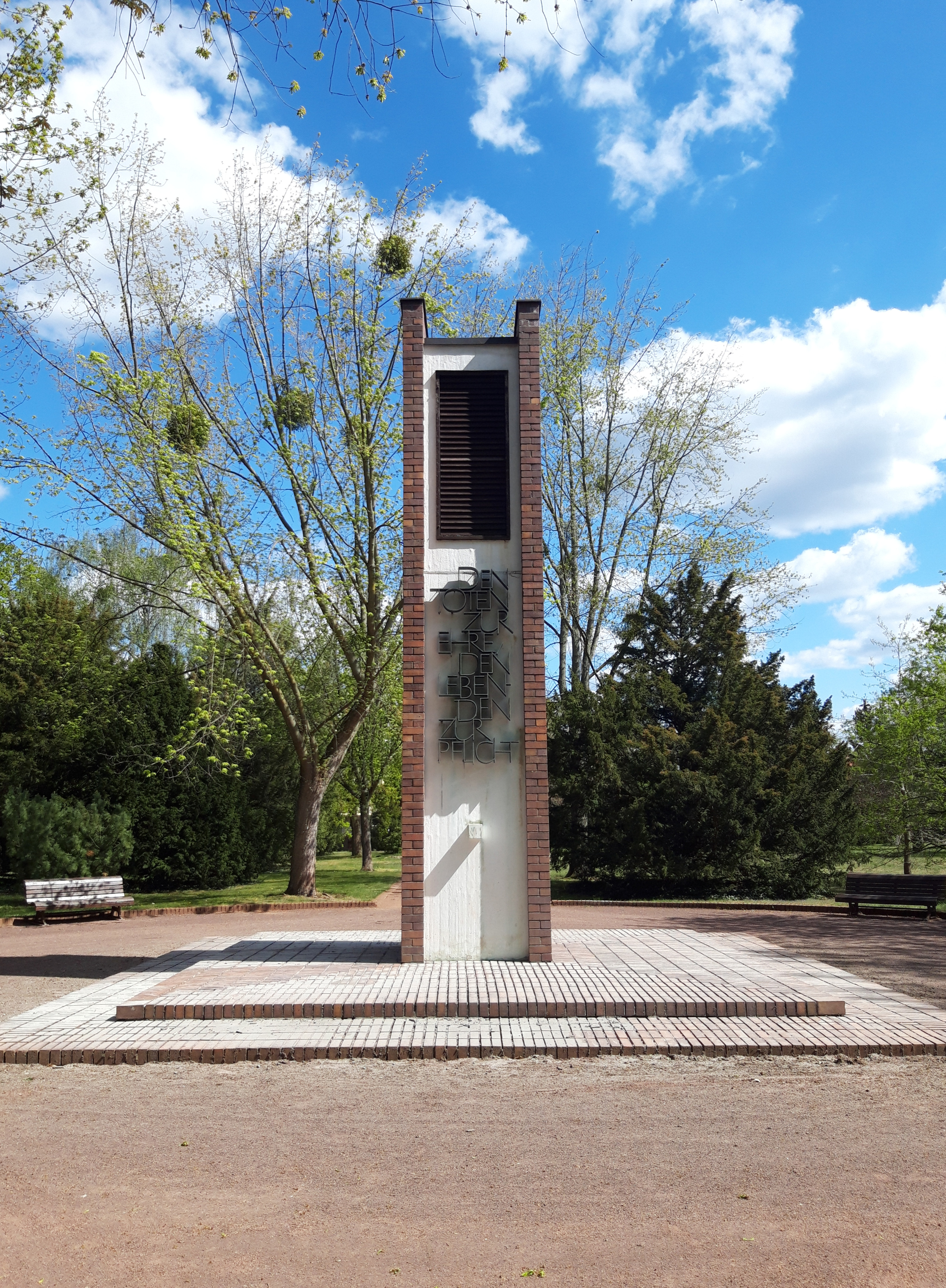 Vorderseite des Glockenturms auf dem Alten Friedhof Potsdam mit metallener Inschrift "DEN TOTEN ZUR EHRE, DEN LEBENDEN ZUR PFLICHT"